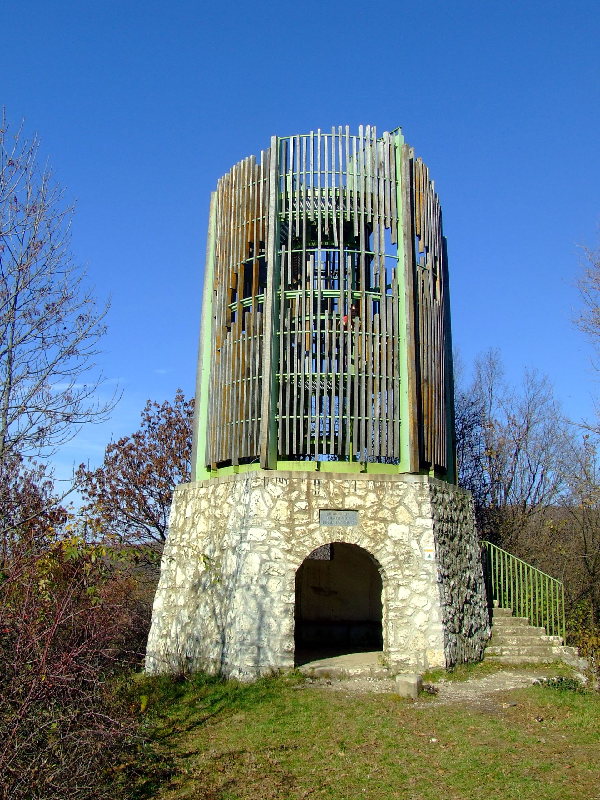 A Cigány-hegyi kilátó a Mecsekben. Épült 2007-ben